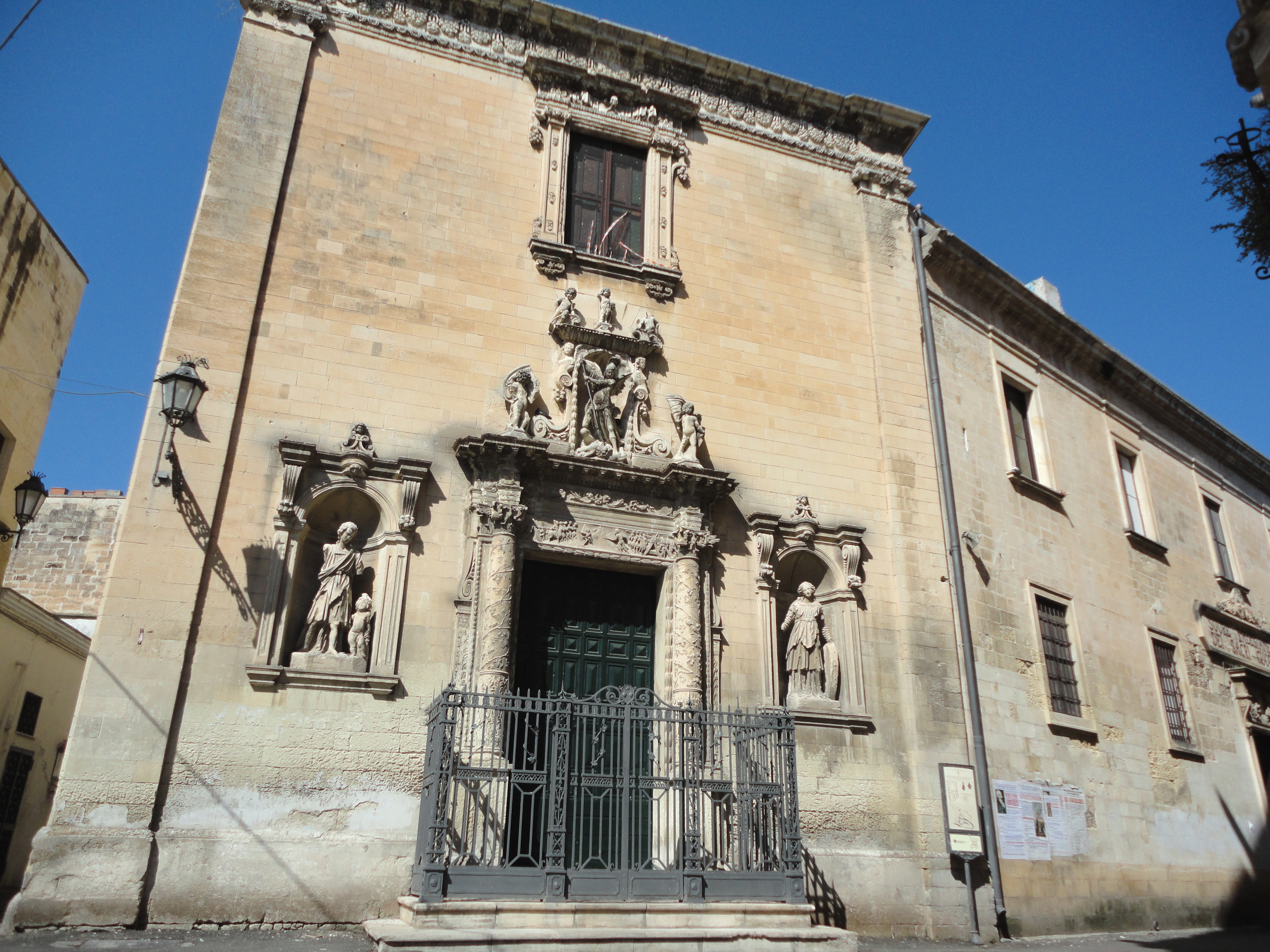 Chiesa delle Scalze a Lecce